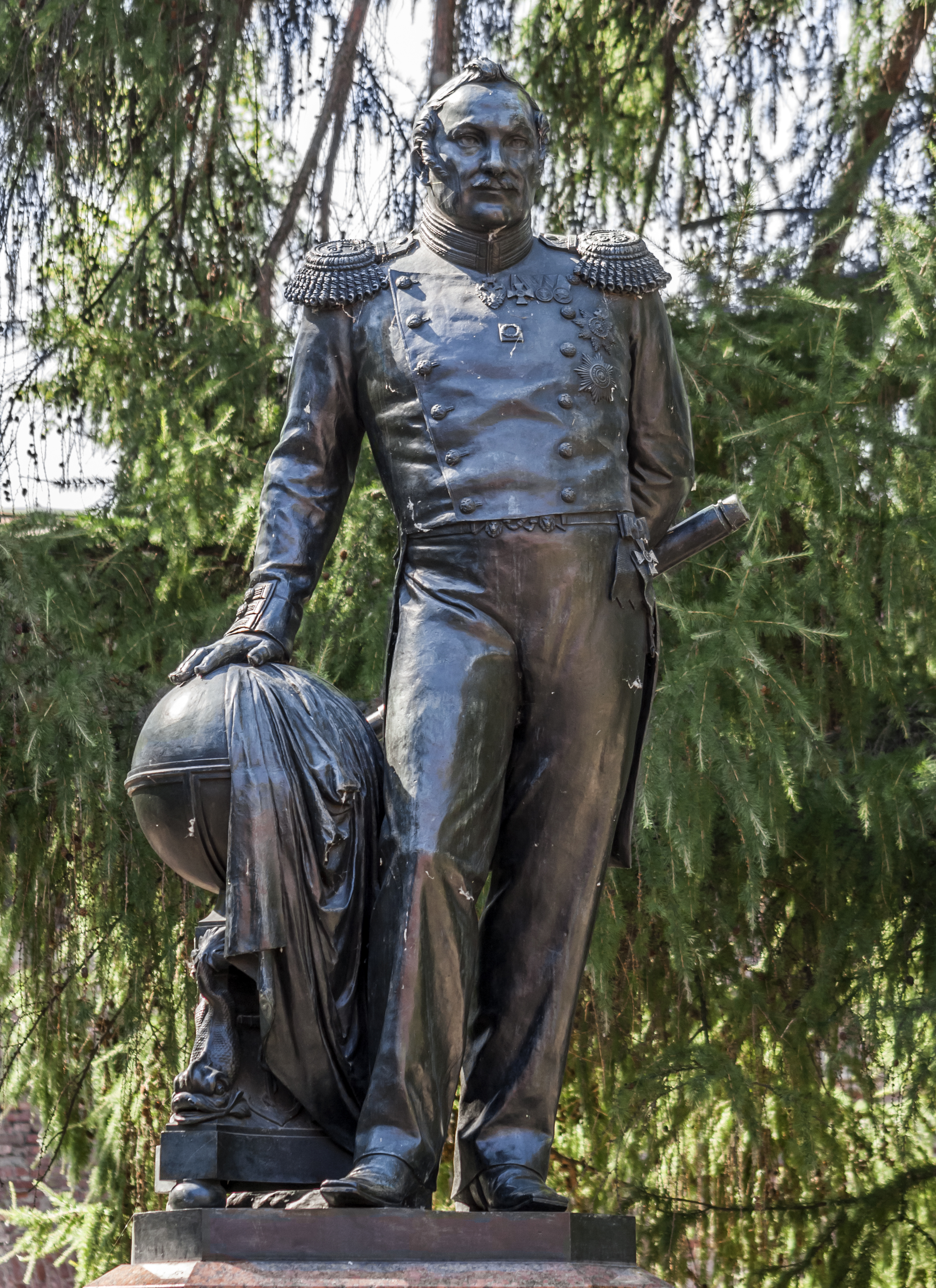 Памятник мореплавателю Беллинсгаузену Ф.Ф.: Советская улица, Кронштадт, Кронштадтский район, Санкт-Петербург